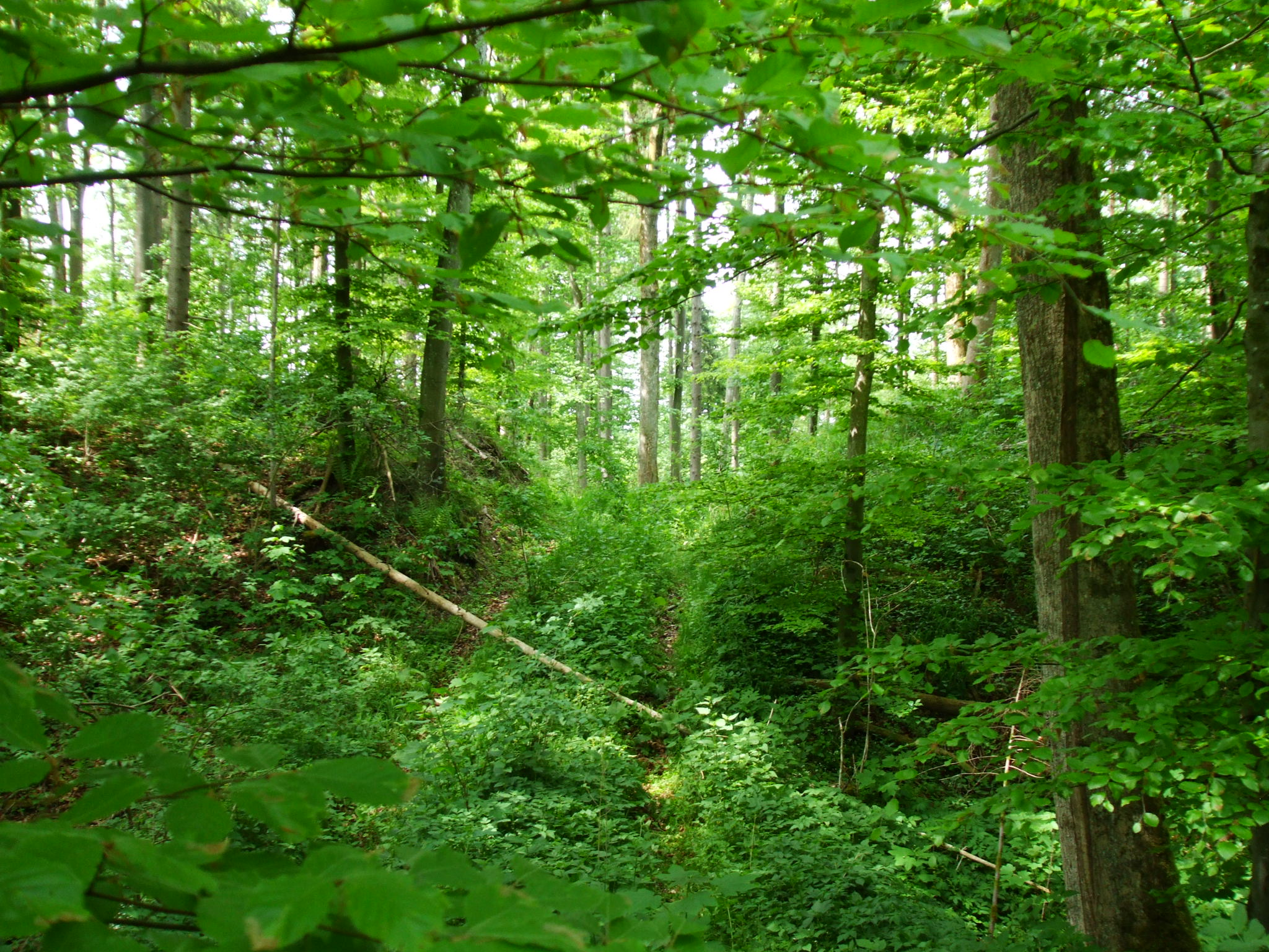 Eingang zur Keltenschanze südlich von Pitzling (Landsberg am Lech)